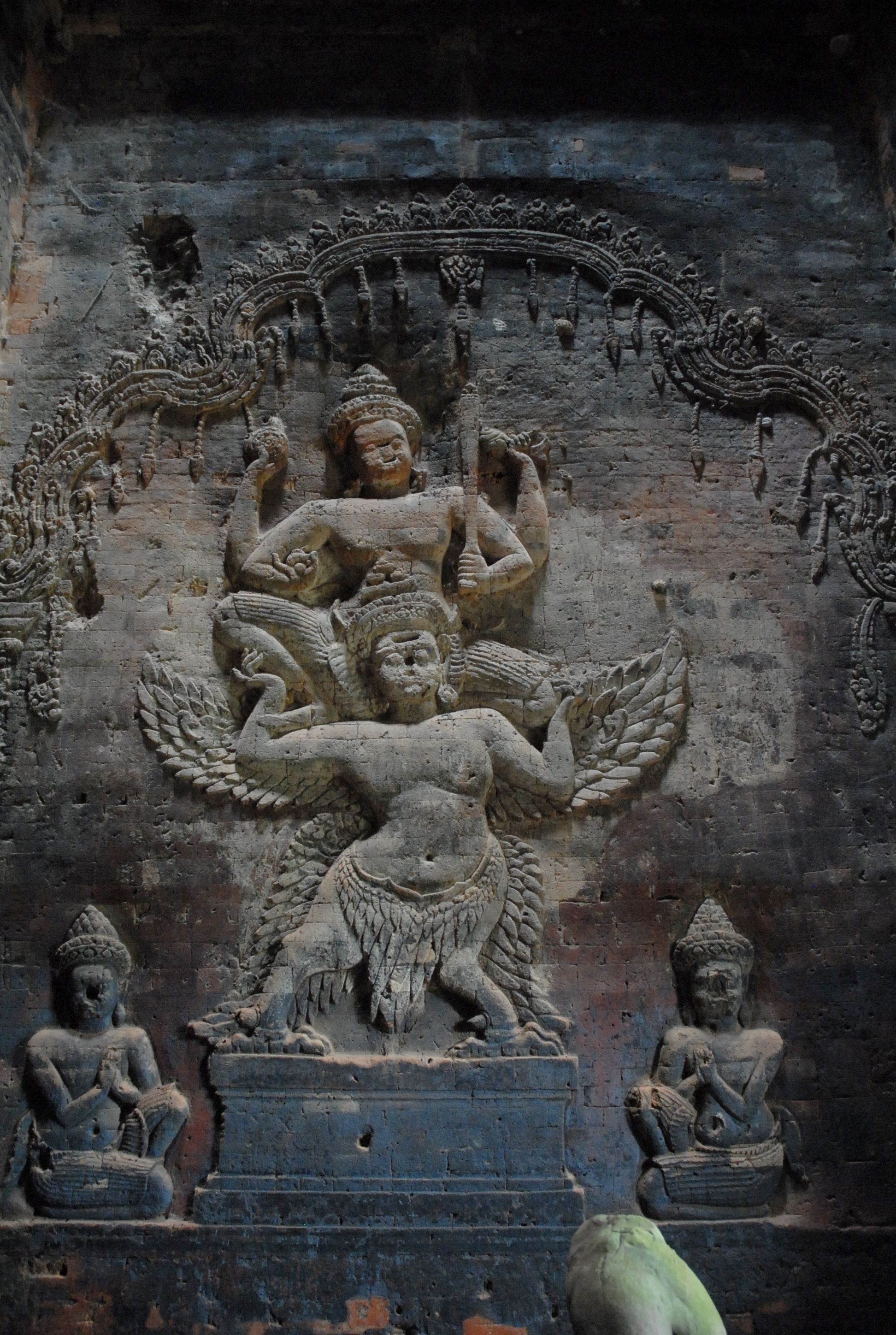 Cambodge, site archéologique d'Angkor, temple de Prasat Kravan, sanctuaire central : Vishnu sur Garuda